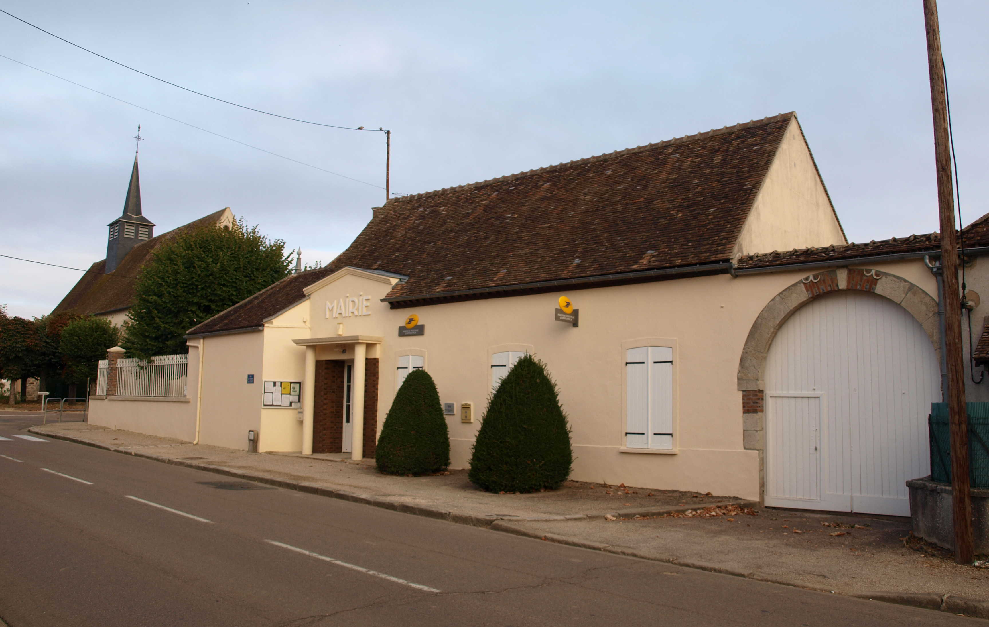 Jouy (Yonne) ; la mairie.